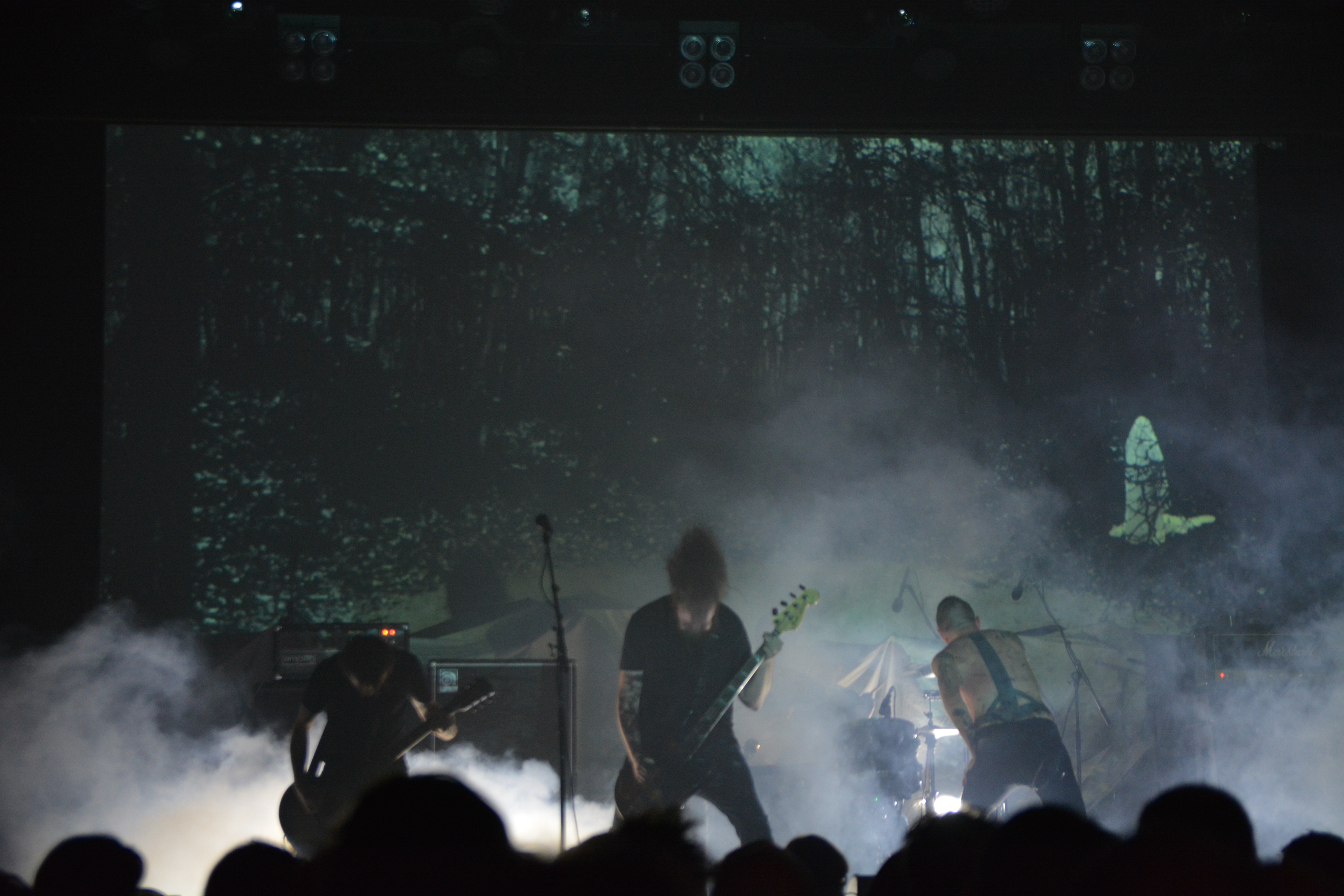 Aufgenommen am 1. November 2013